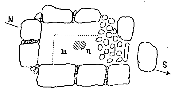 Grundriss des Großsteingrabes Cramon